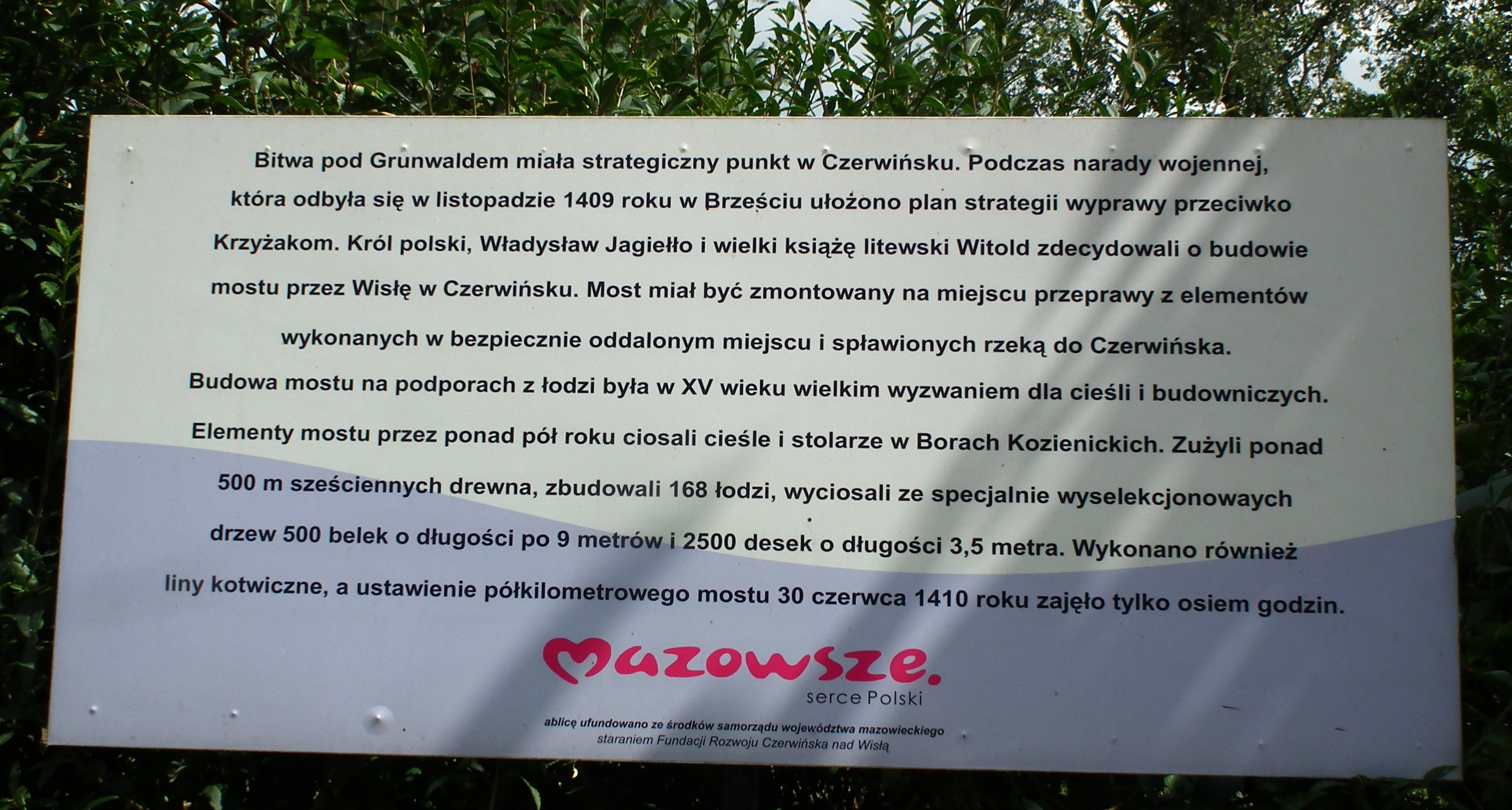 Czerwińsk Nad Wisłą - miejsce po moście łyżwowym z 1410r.